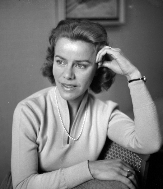 Den svenska skådespelaren Ruth Kasdan 1956